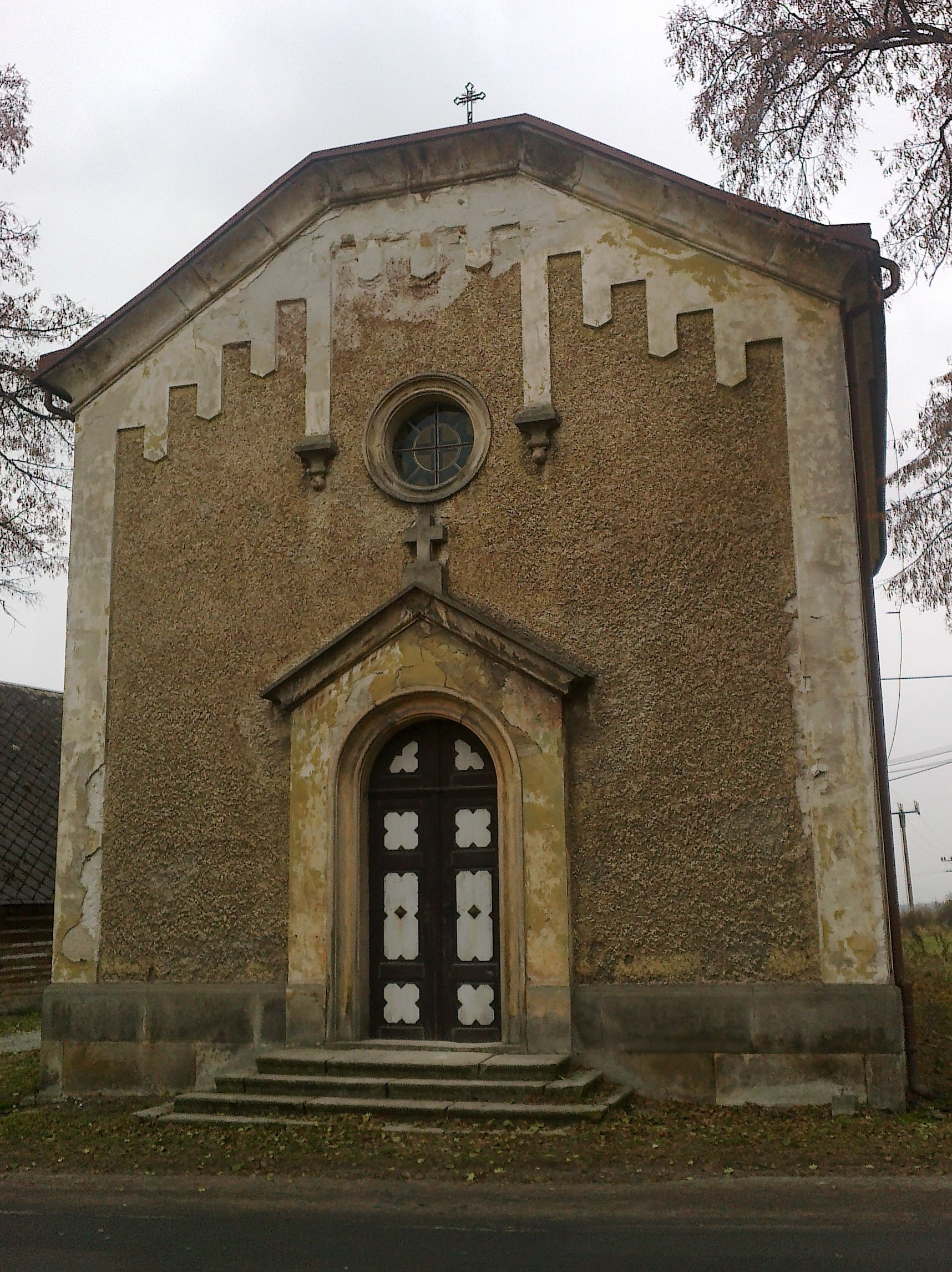 Kocbeře - kaple sv. Floriána1